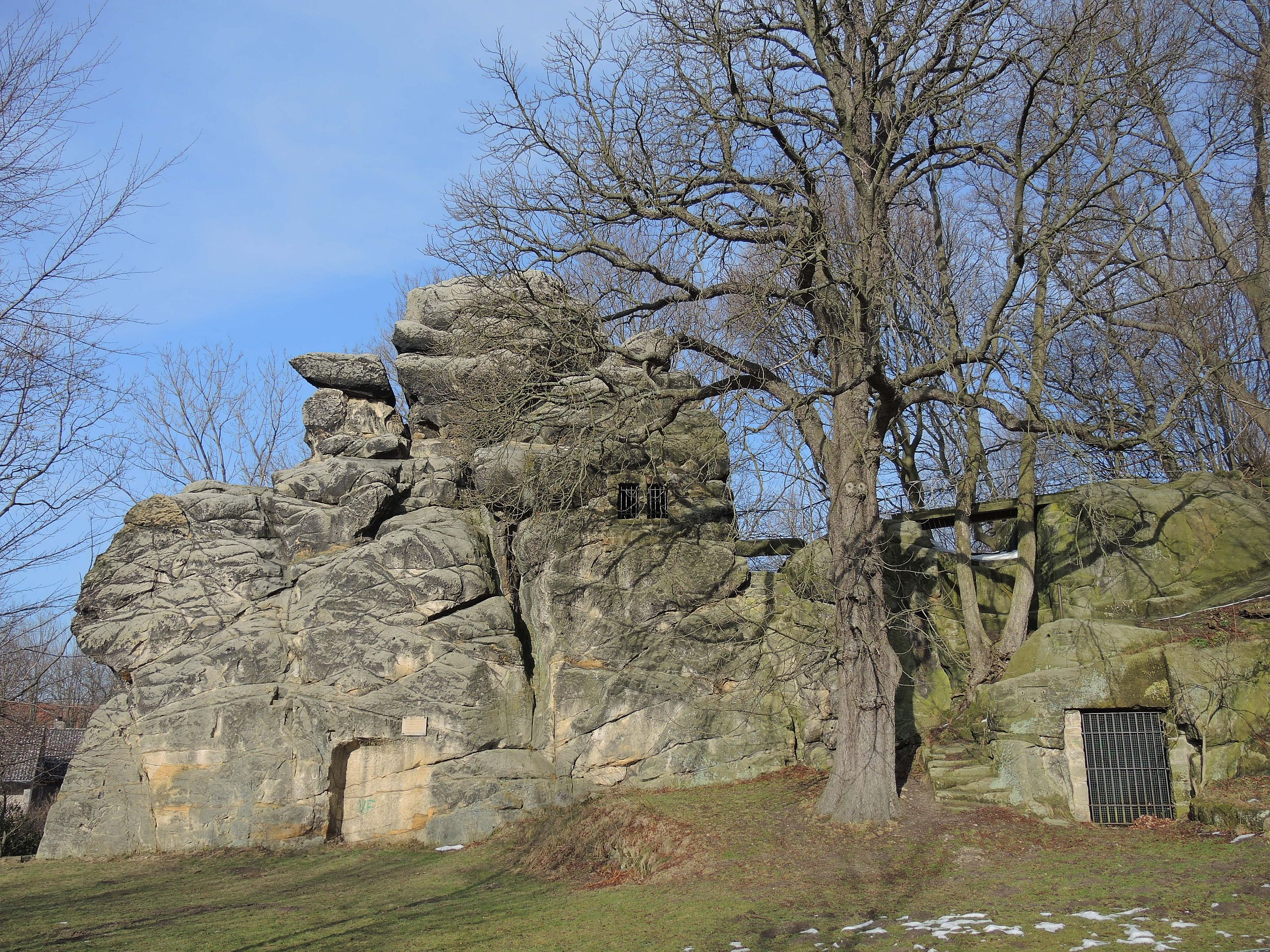 Westseite des Klusfelsens in Goslar